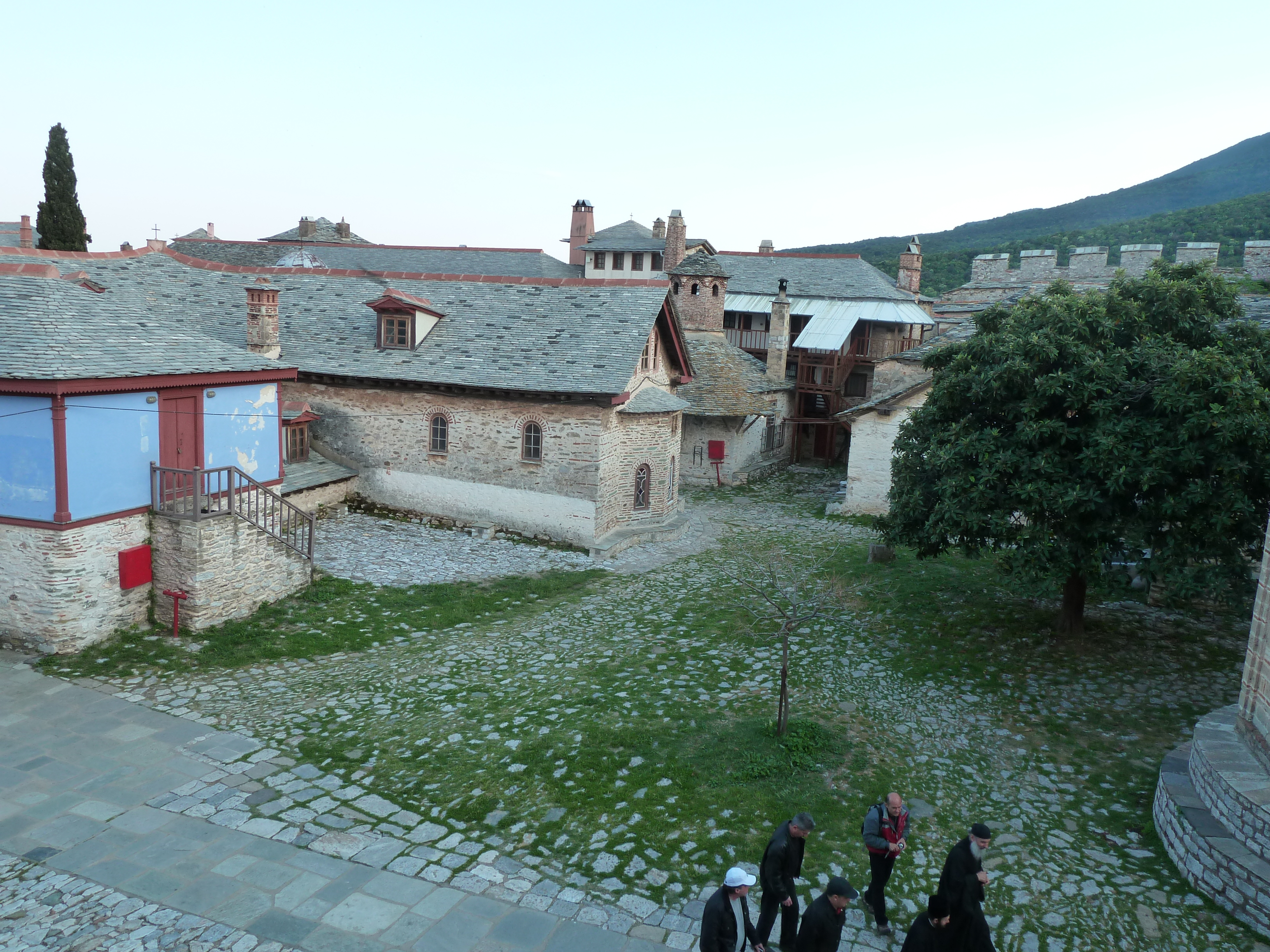 Cour intérieure du monastère de la Grande Laure (Mont Athos)